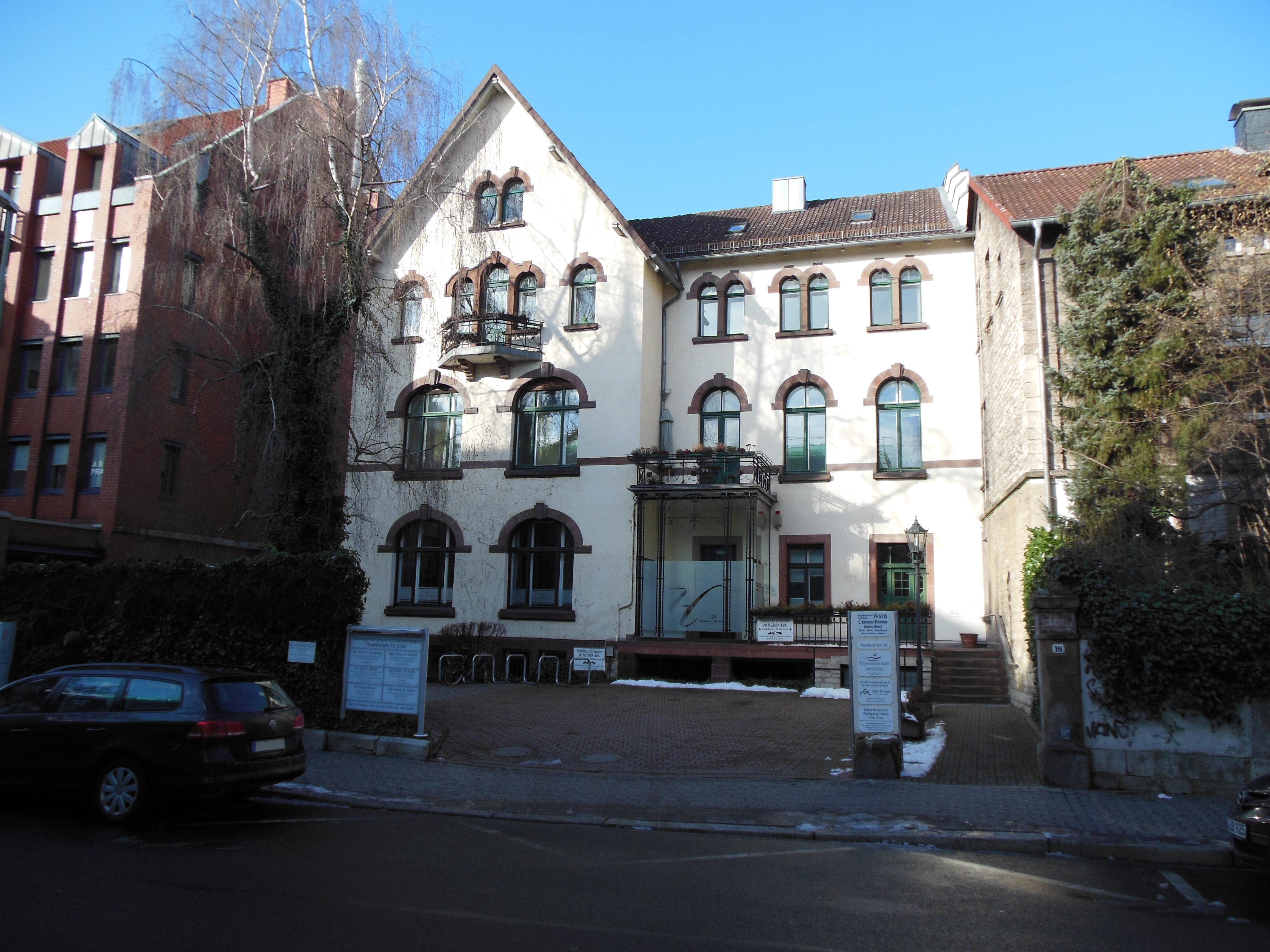 Filiale Göttingen der Bankhaus Hallbaum AG, Theaterstraße 16, 37073 Göttingen, Deutschland.